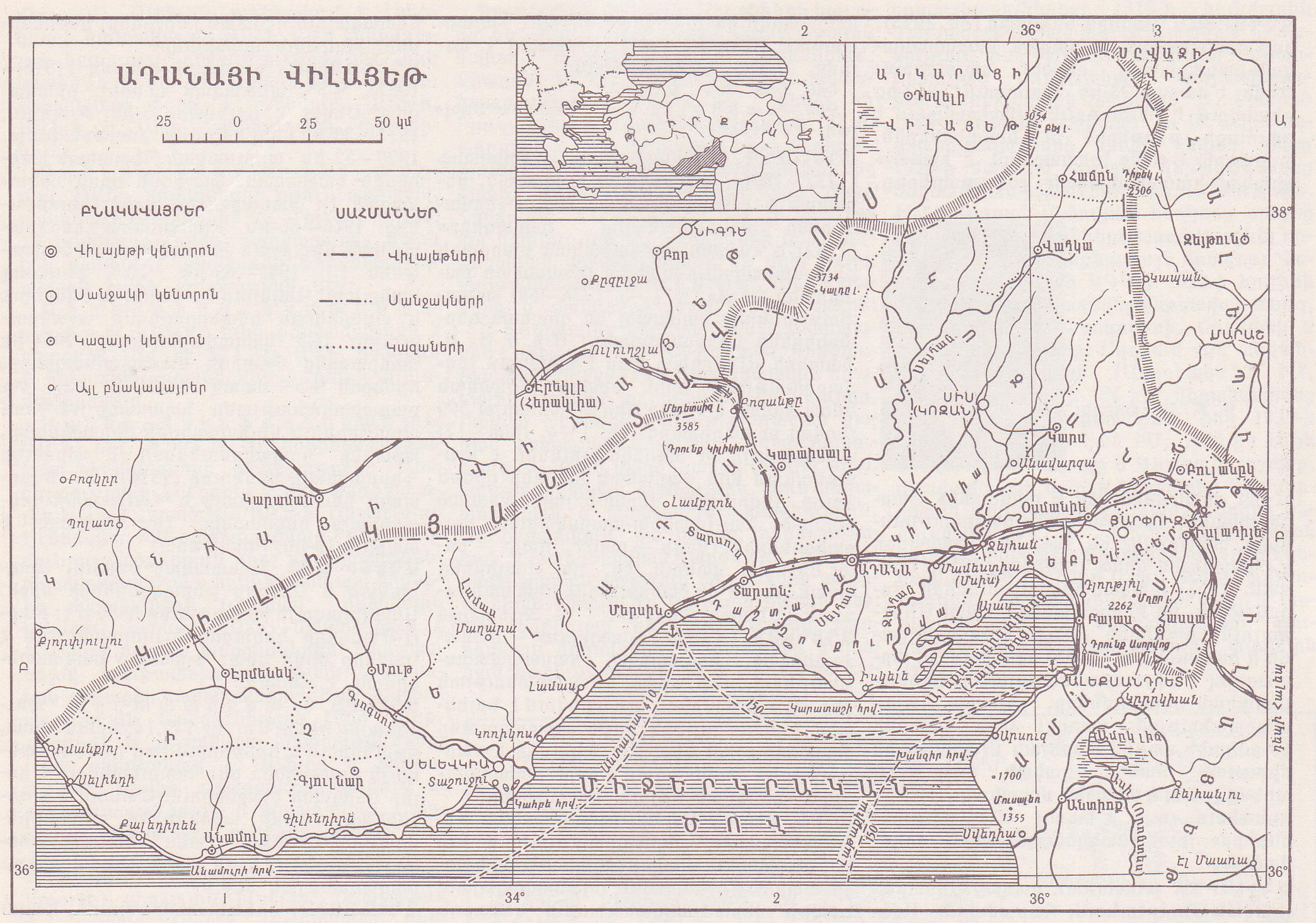 Ադանայի վիլայեթ